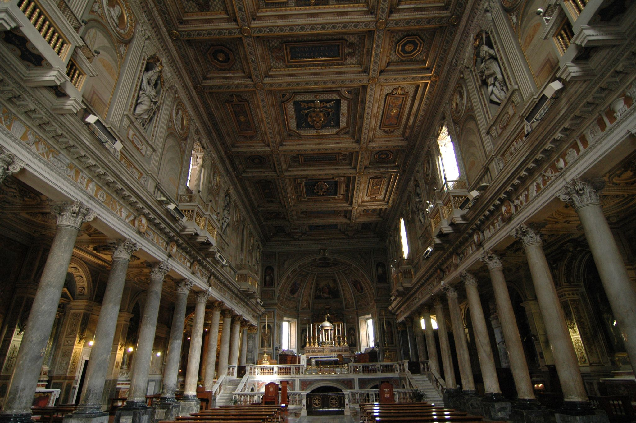 San Martino ai Monti (Rome)